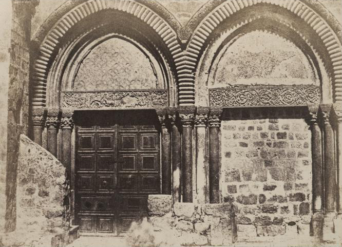 Saint Sépulcre, entrée principale, Jerusalem.